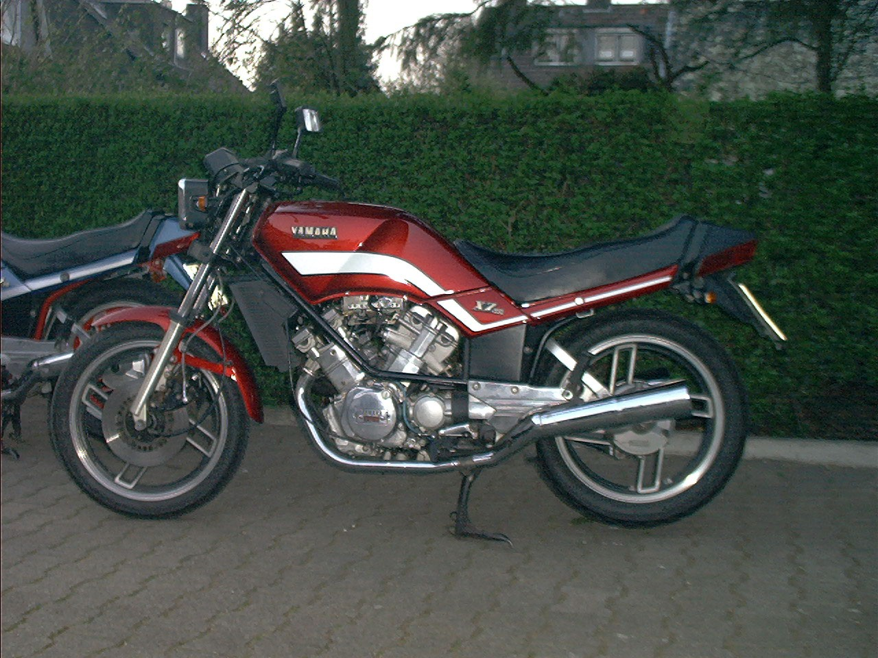 Yamaha XZ550 ohne Verkleidung